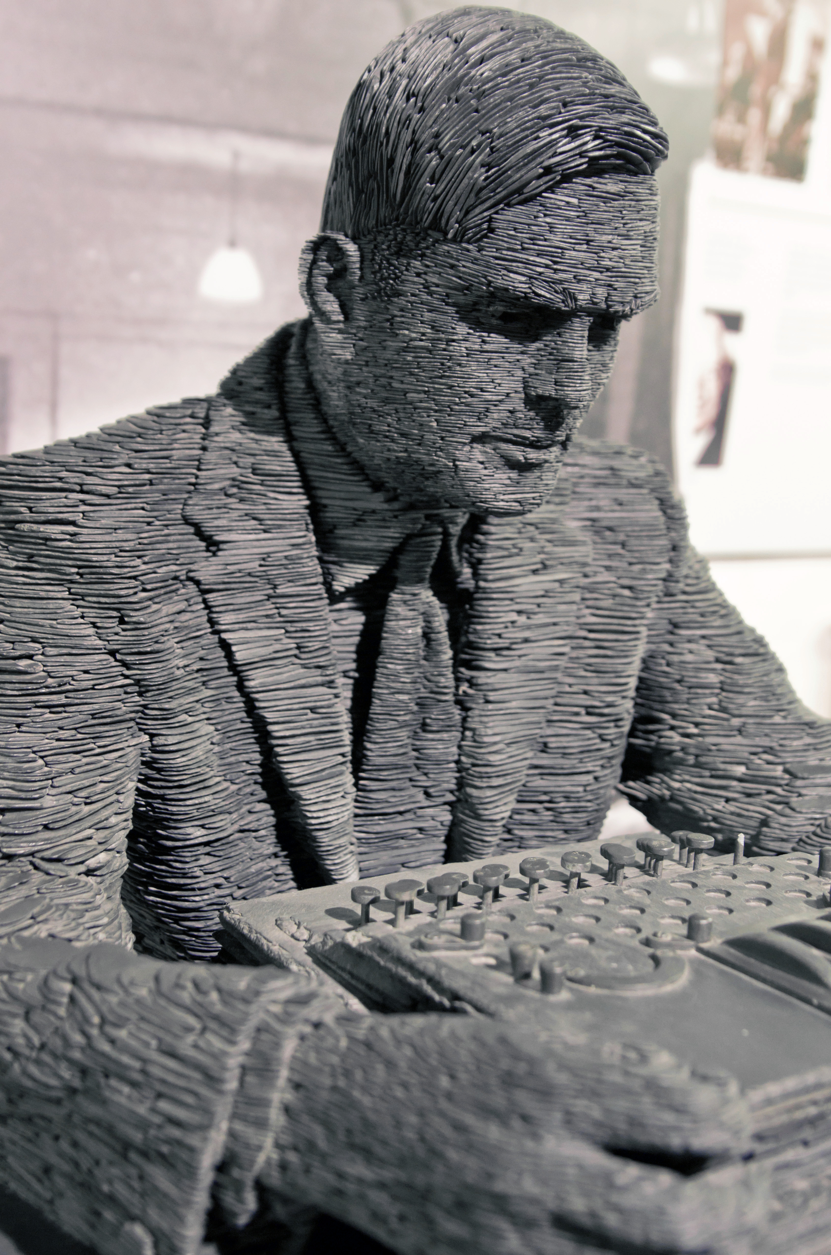 Turing statue at Bletchley Park (made with slates)